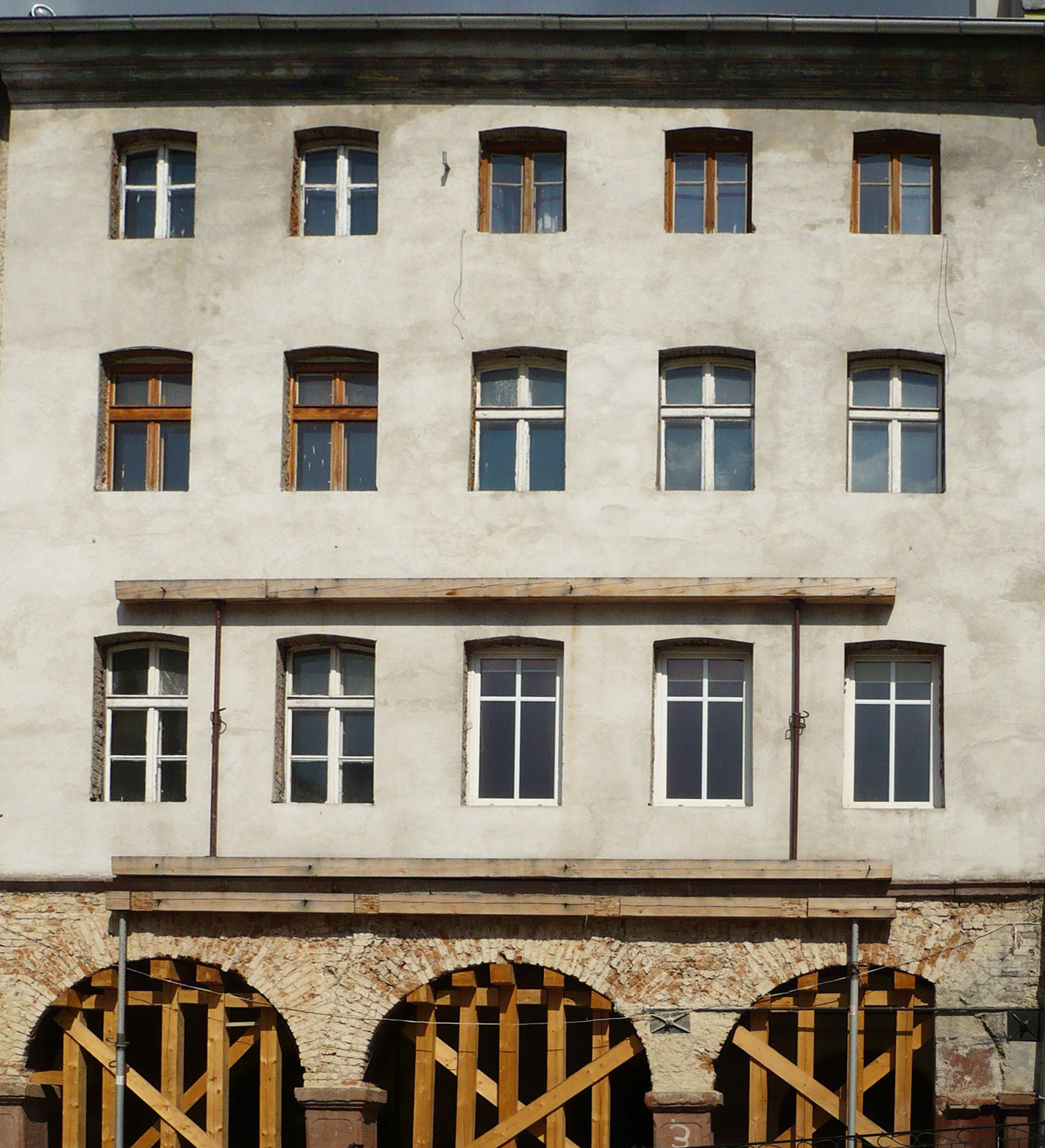 Nowa Ruda, Rynek 3 - kamienica, 1736, przebud. XIX, XX w. (zabytek nr A/950/1567 z 16.03.1966)